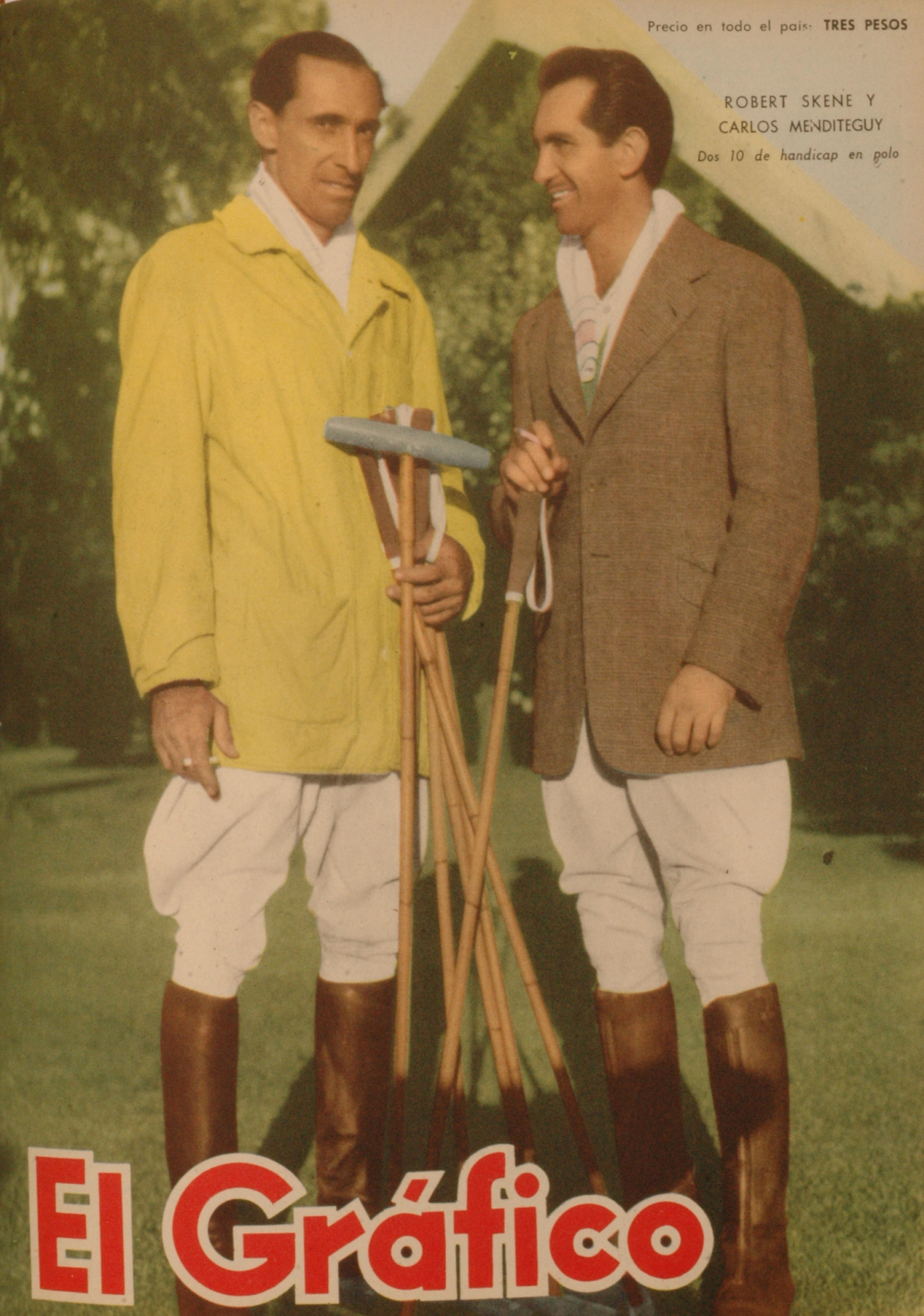 El Grafico del 01 de Febrero de 1957. Edicion 1951